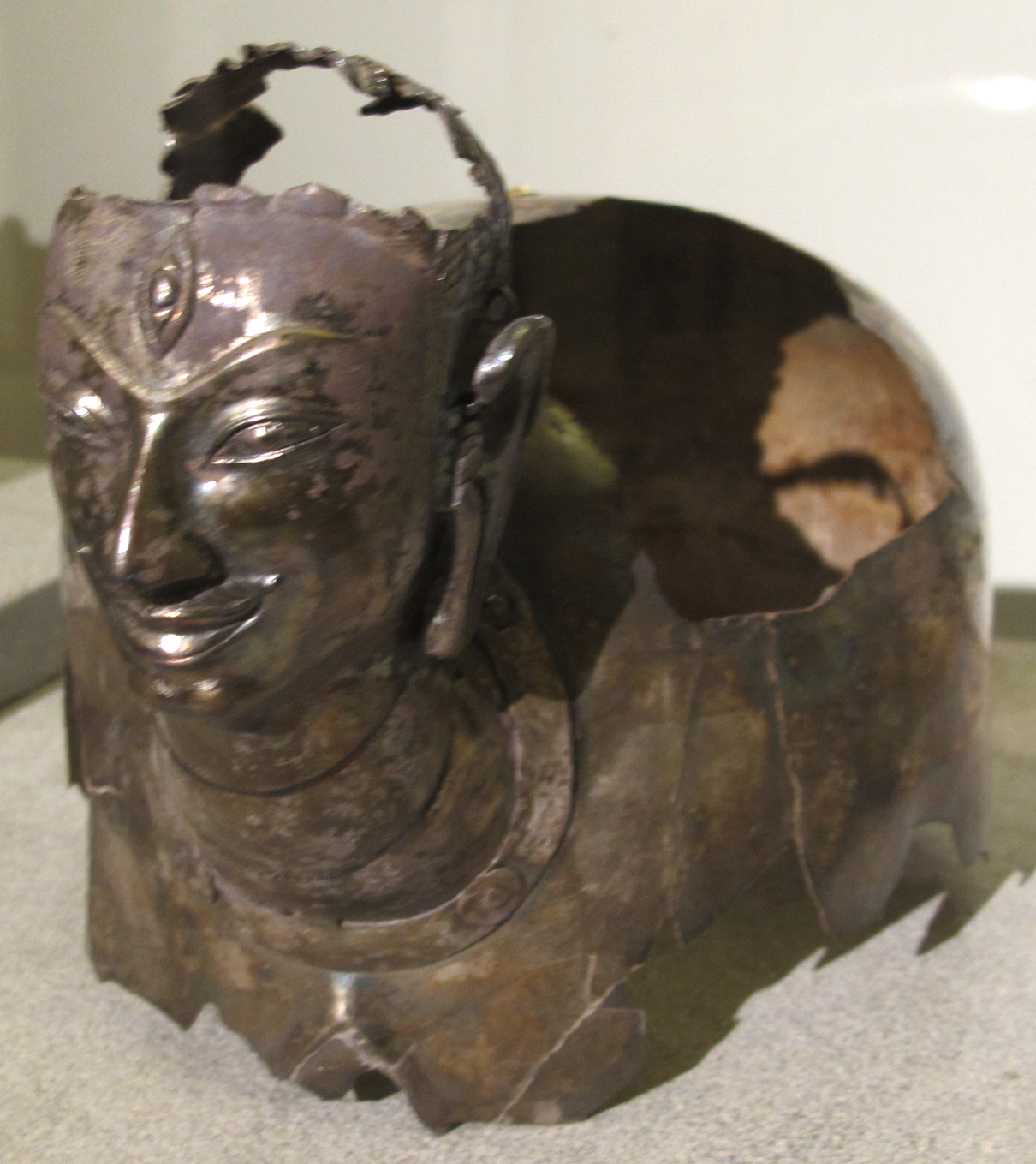 Vietnam, copricapo linga, da champa, viii sec, argento